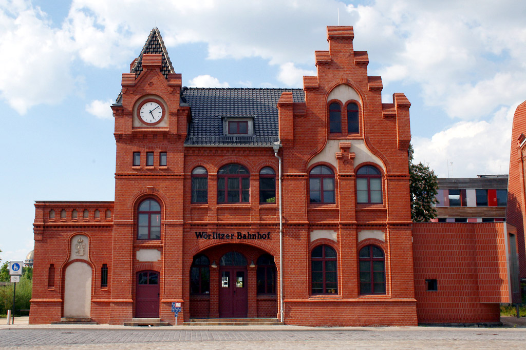 Dessau, Wörlitzer Bahnhof (UBA-Gelände)